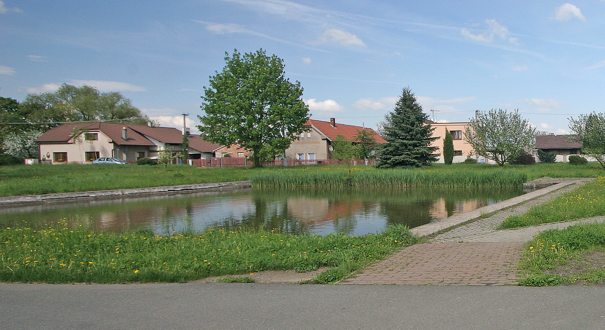 Újezd u Přelouče hřiště u rybníka na návsi